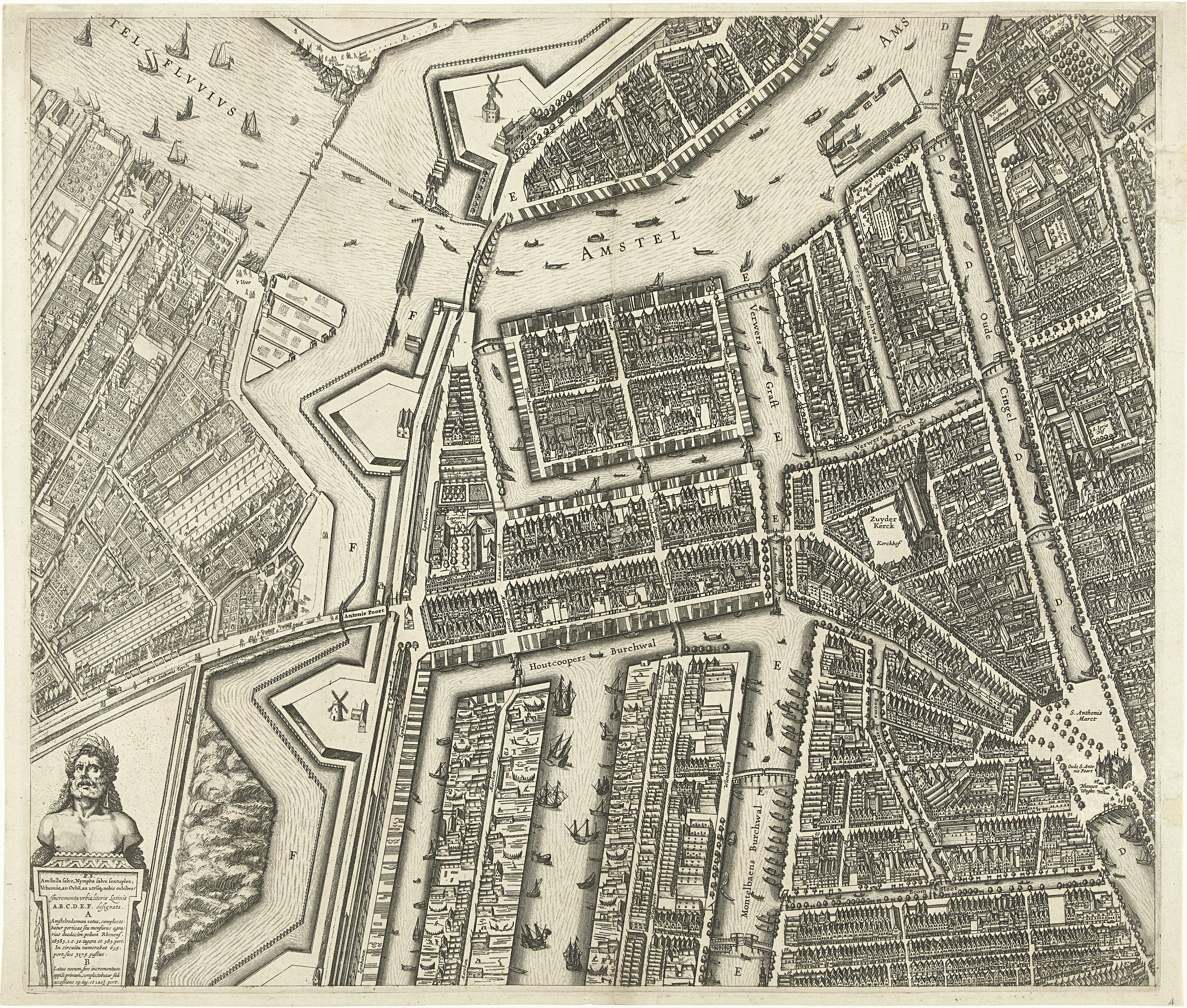 Grote plattegrond van de stad Amsterdam uit 1625. Linksboven een gezicht op de stad en rechtsboven een kaart van de omgeving. Rechts een lijst met de namen van straten aan de Oude en de Nieuwe stadszijde. De plattegrond is samengesteld uit negen platen, waarvan twee ontbreken. Dit is het blad middenlinks met de Waag en het Zuiderkerkhof.